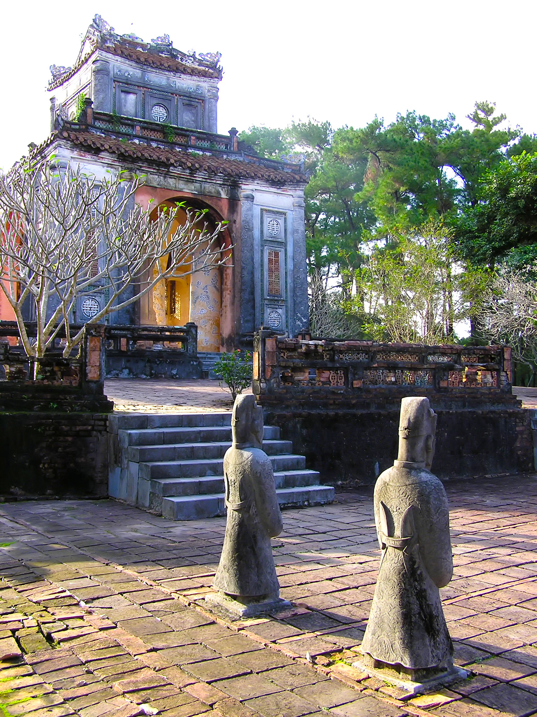 Vietnam - Hué - Garde d'honneur devant le pavillon de la stèle au domaine du Tombeau de l'empereur Tu Duc